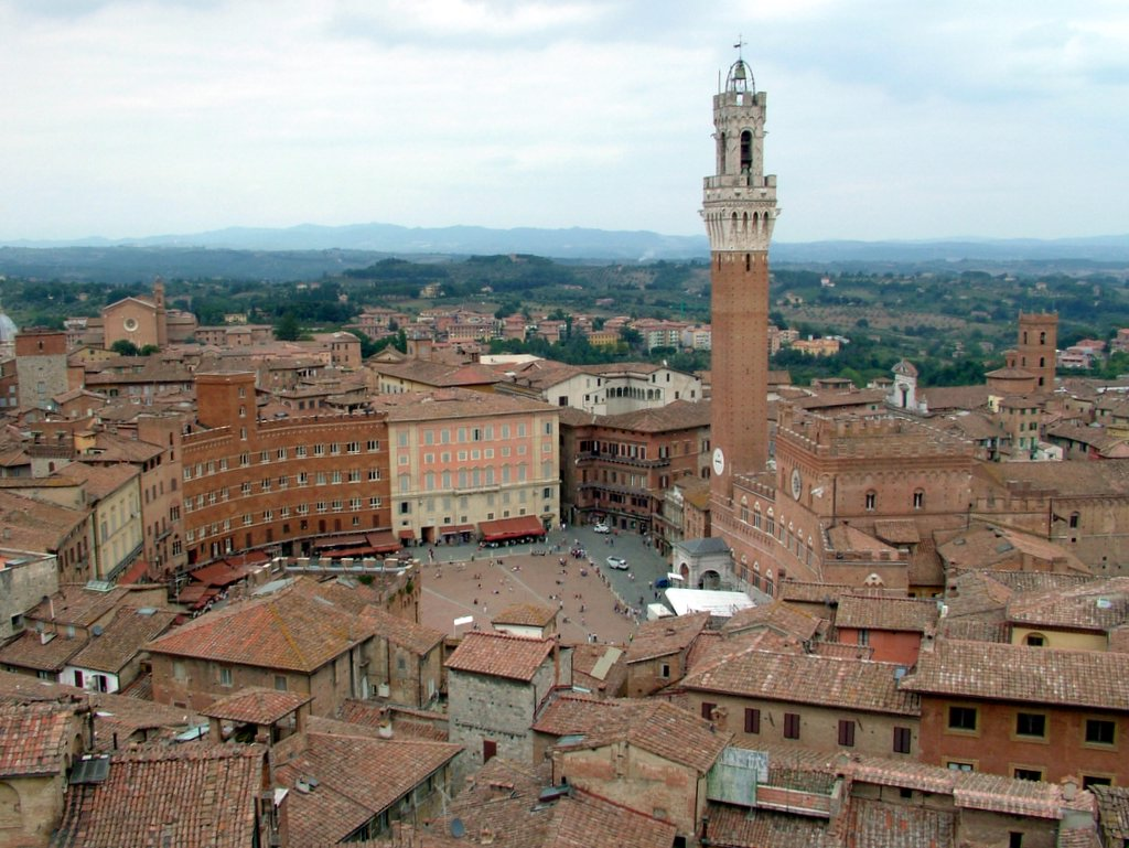 Piazza del Campo in Siena, Italy.